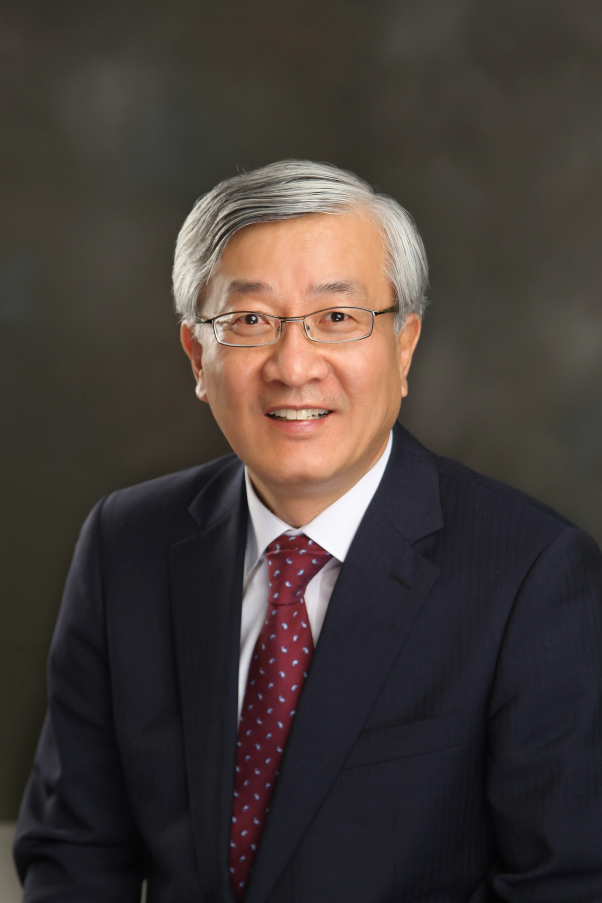 노영상 총장 사진